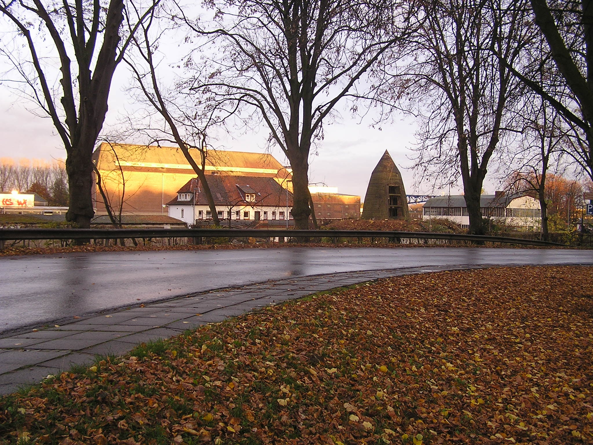 Silo und Bunker nach Leo Winkel an der Schachtschleuse in Minden